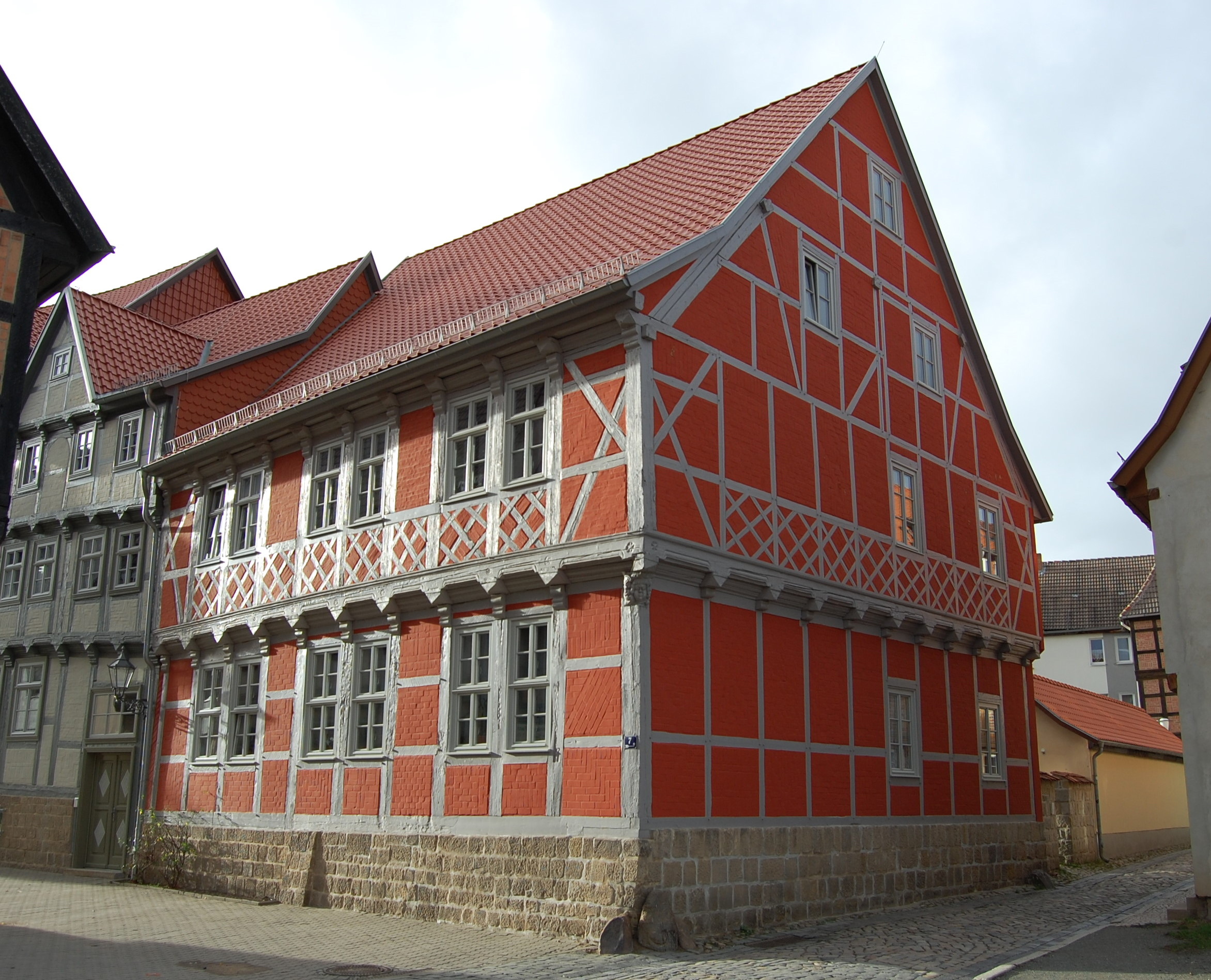 Haus Schmale Straße 7 in Quedlinburg, nach rechts sichtbar die Essiggasse